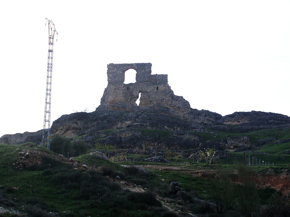 Castle, Beleña de Sorbe, provincia de Guadalajara, en Castilla-La Mancha, España.